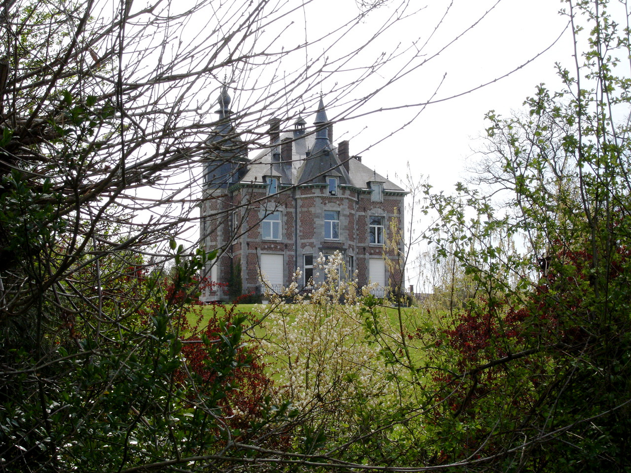 Le château de Wanlin (appartenant à la famille de Cumont).